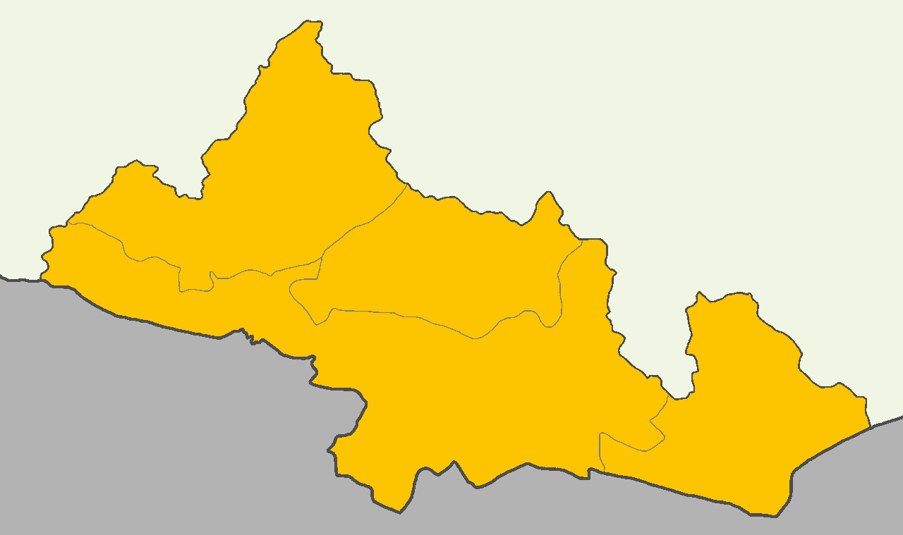 Kilis'te 2014 Türkiye cumhurbaşkanlığı seçimi sonuçları